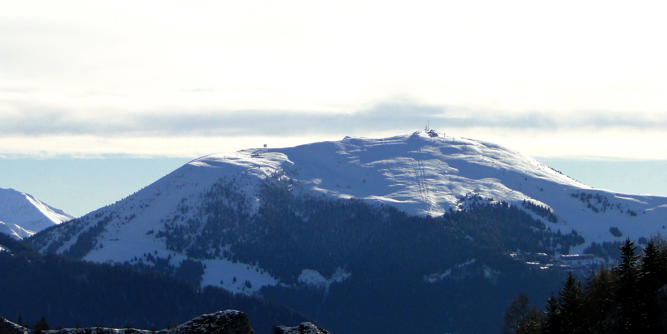 Monte Pora. Prealpi bergamasche.